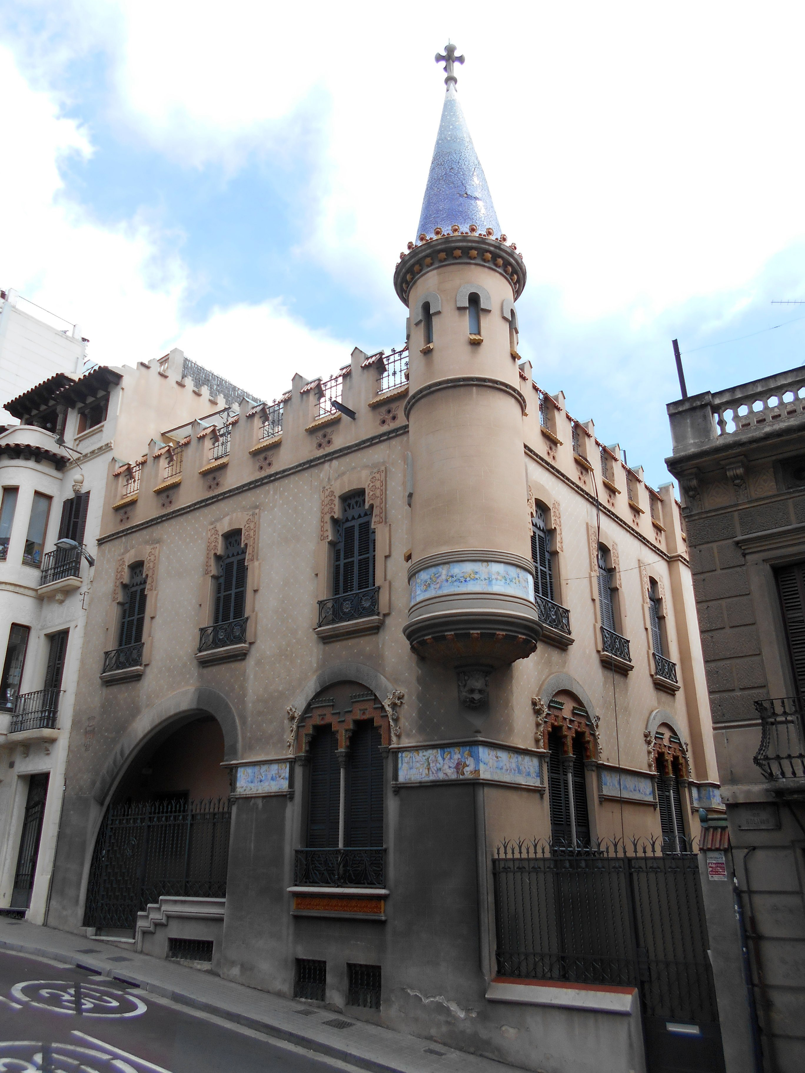 Casa Comas d'Argemir.